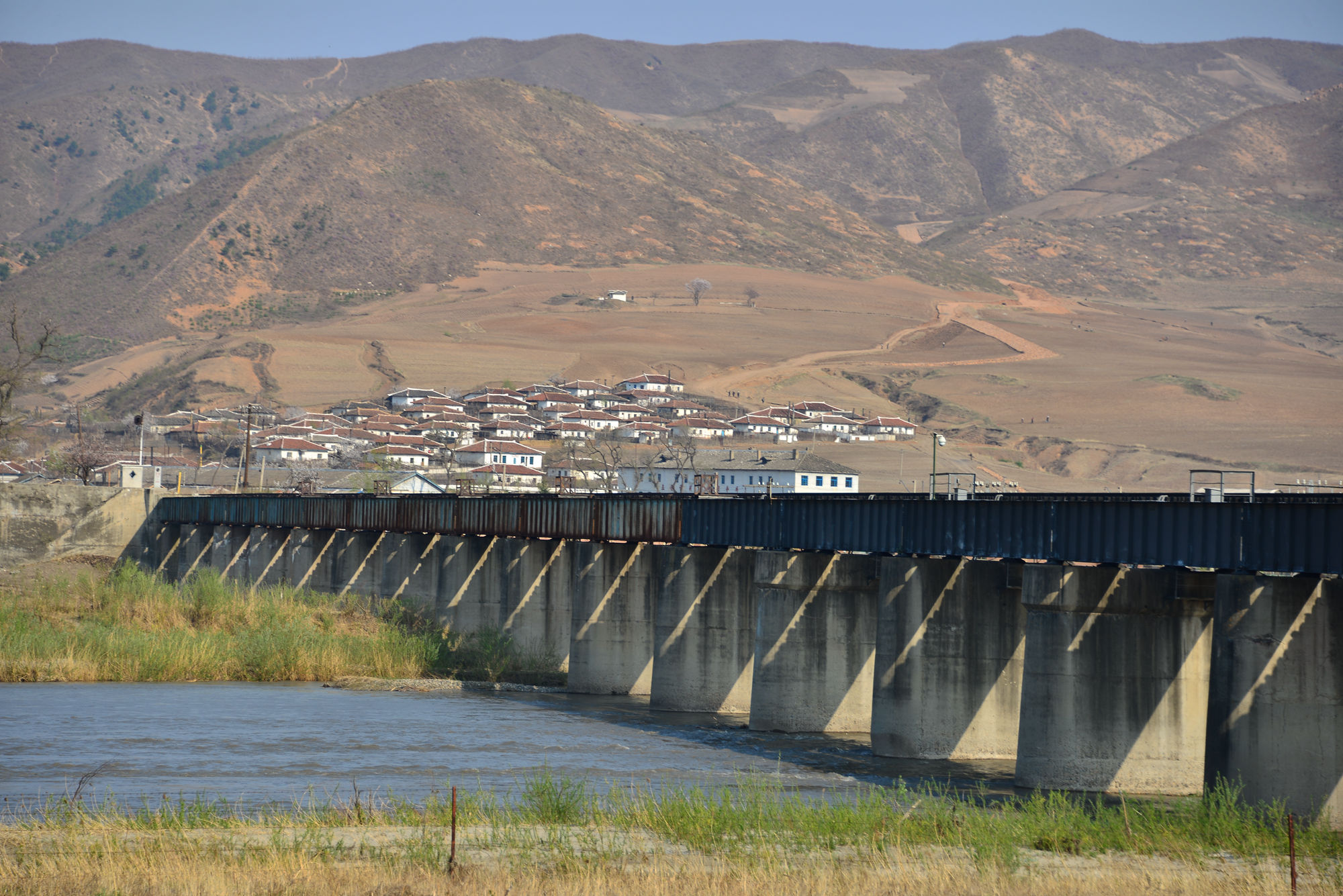 巡道工出品 photo by Xundaogong 图们江铁路桥